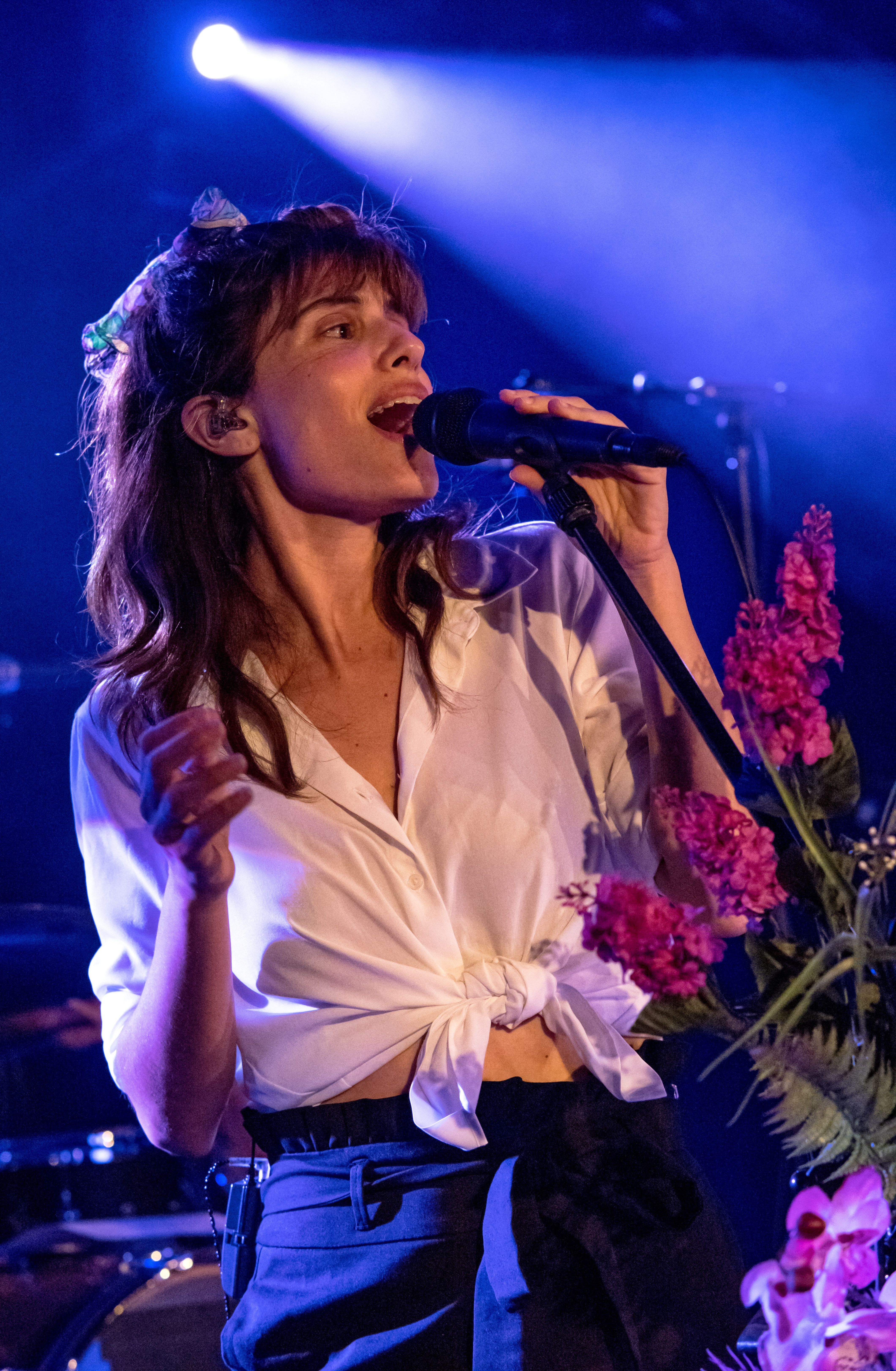 Bilder vom Zelt Musik Festival 2018 in Freiburg im Breisgau Lola Marsh am 1. August 2018 im Spiegelzelt